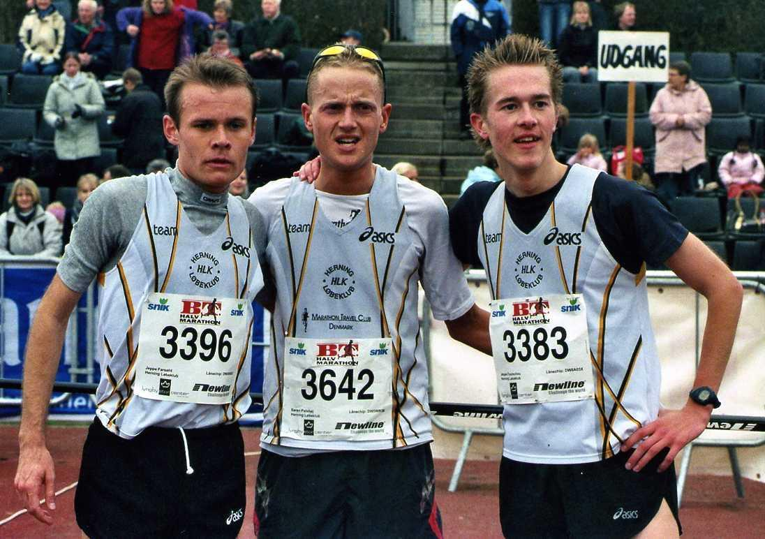 Jeppe Farsøht, Søren Palshøj og Jesper Faurschou efter at have vundet dm for klubhold ½marathon